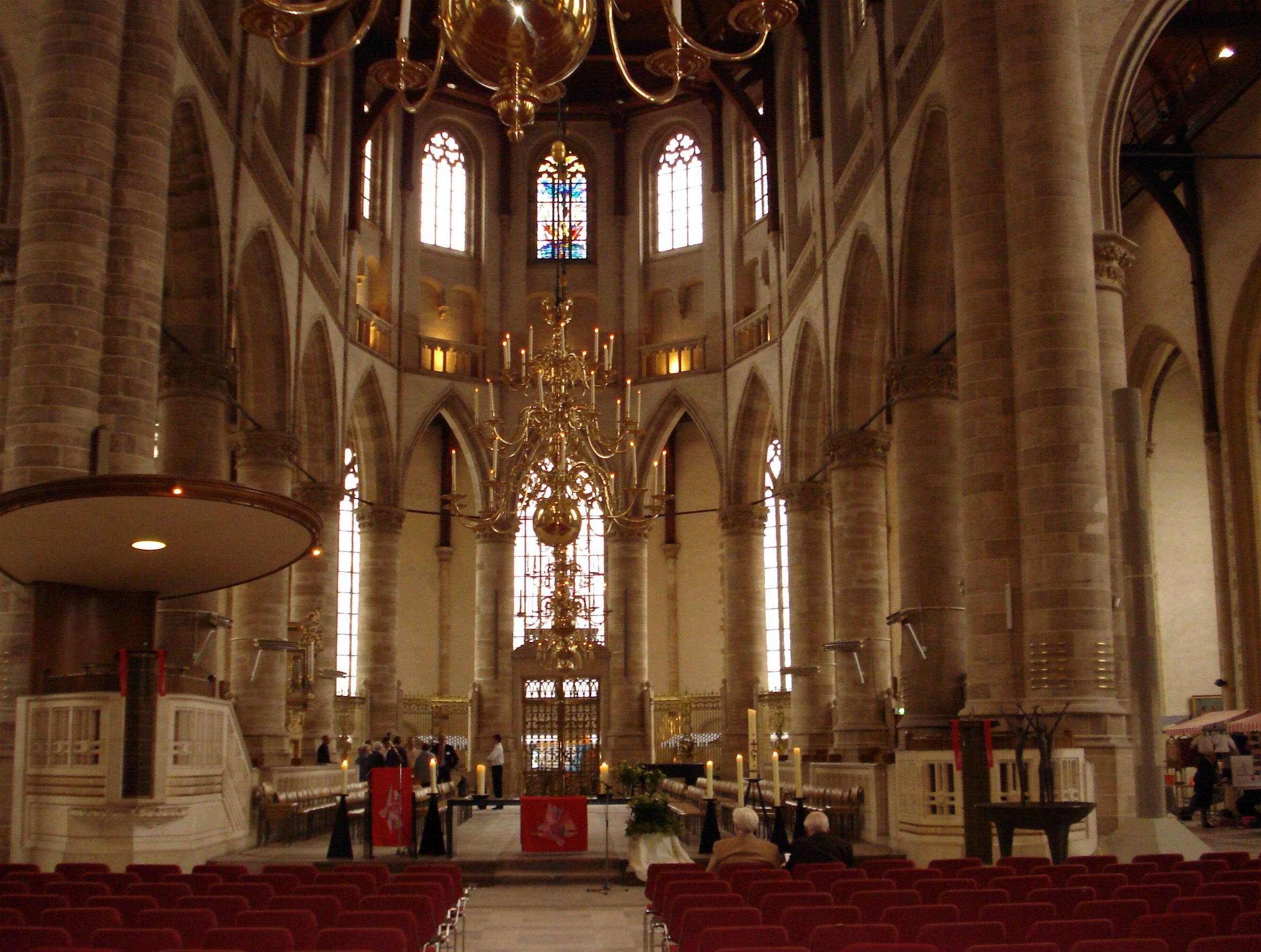 Rotterdam, St. Laurenskerk. Interieur.